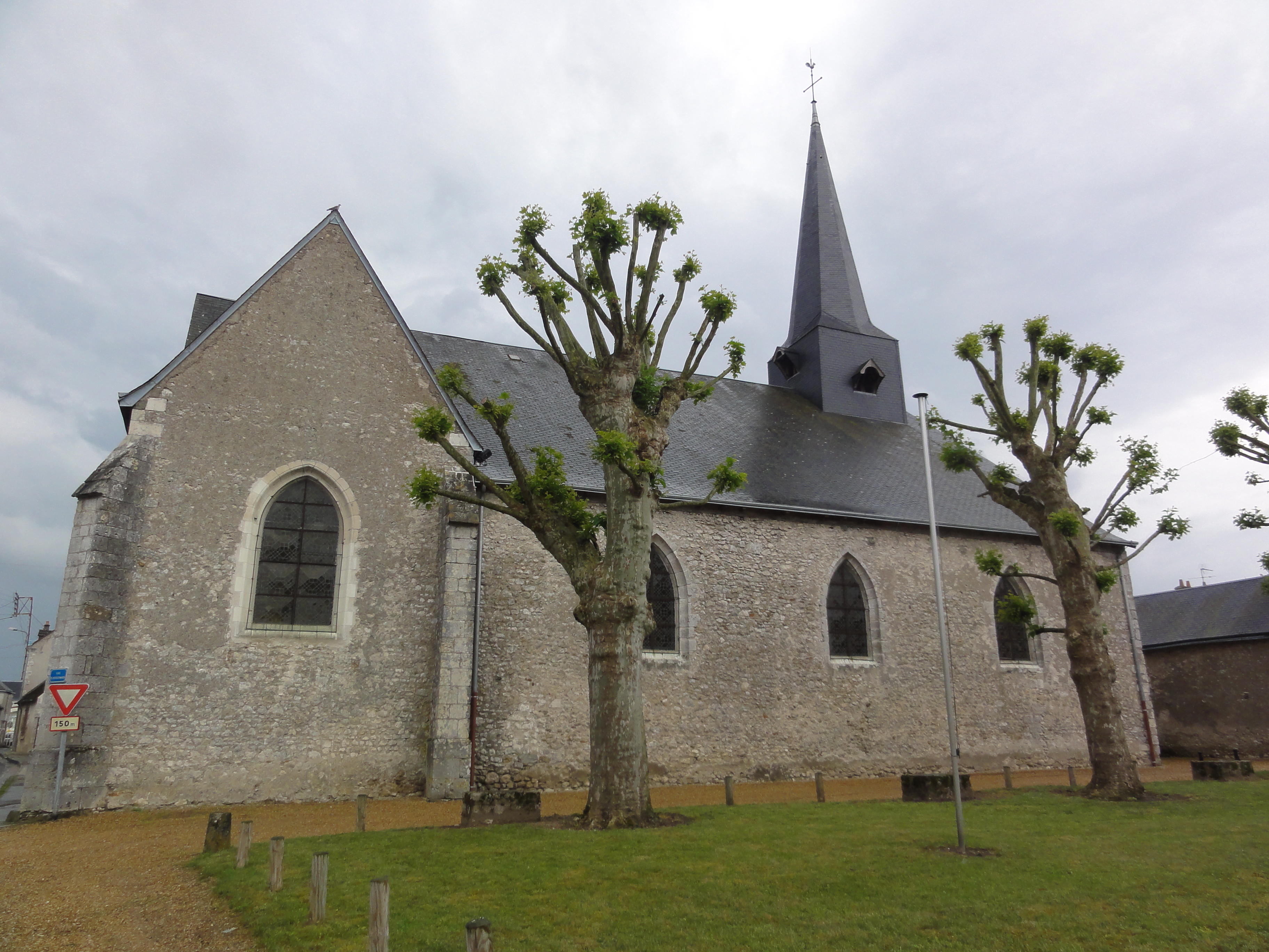 Saint-Claude-de-Diray (Loir-et-Cher)